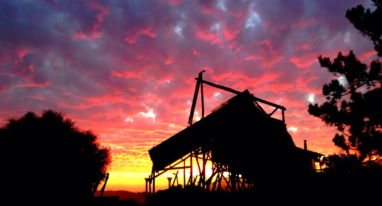 Viernes 3 de mayo del 2013